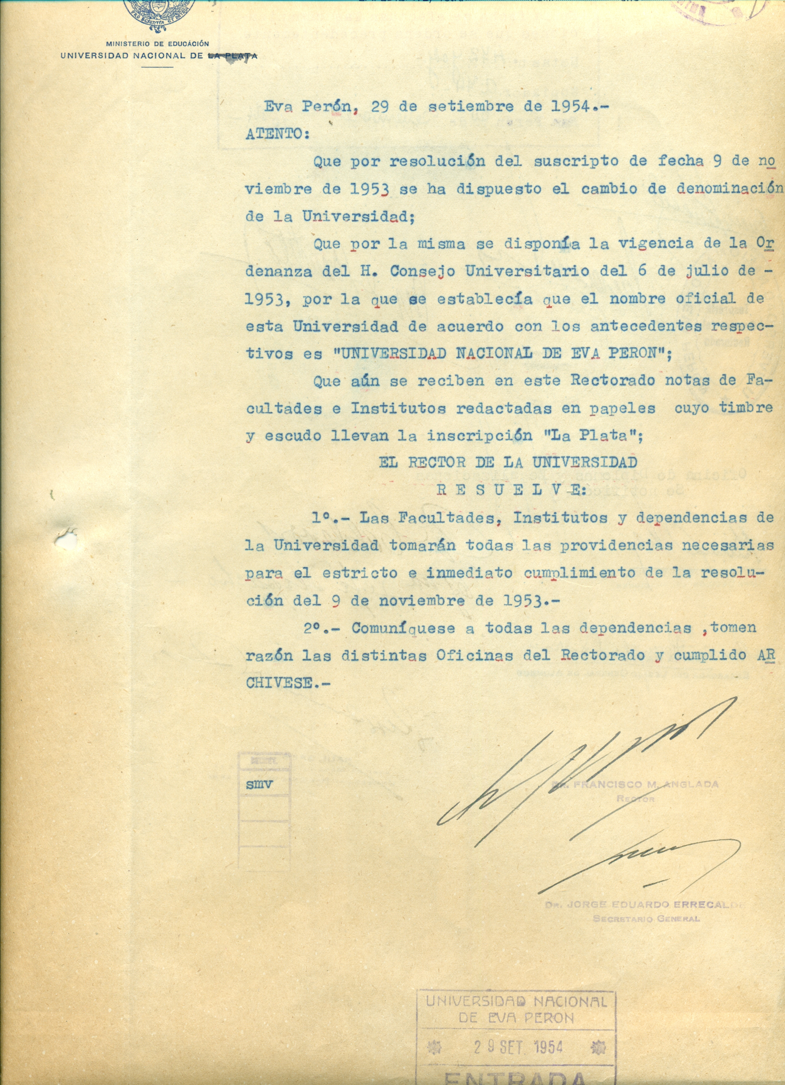 Archivo histórico de la UNLP en el que el Rector de la universidad exige el total cambio de nombre de las instituciones pertenecientes a la UNLP.